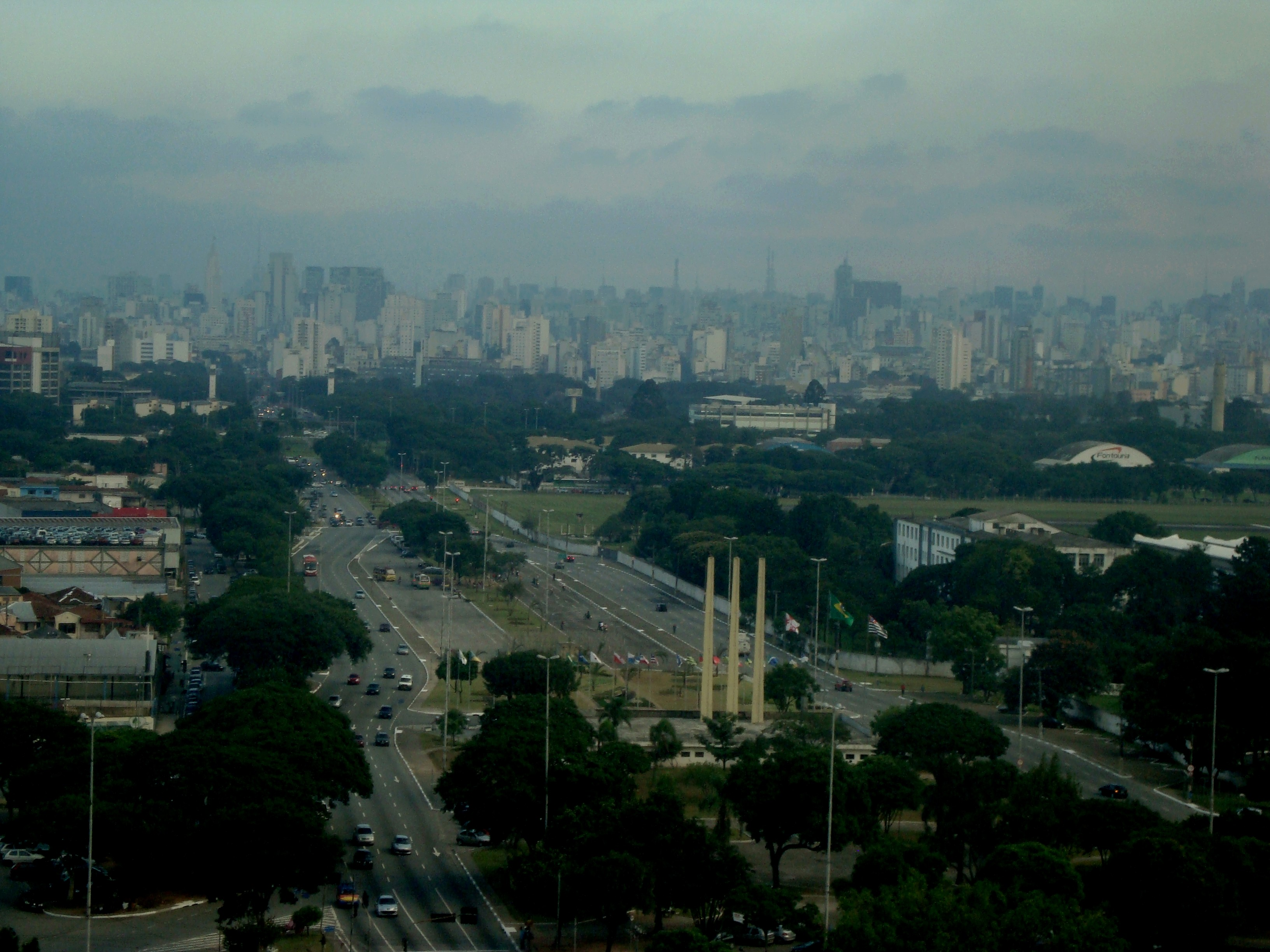 Foto da Avenida Santos Dumont no bairro de Santana